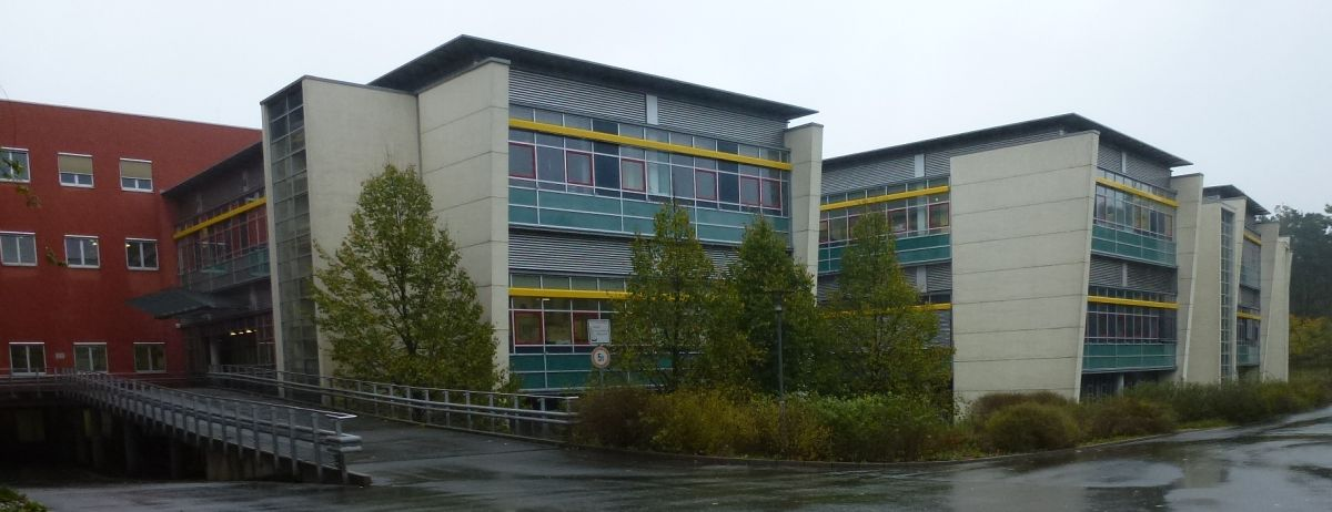 Waldkrankenhaus in Eisenberg